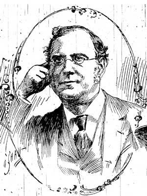 Marc-Abraham Delafontaine (Céligny ,Ginebra, Suïssa, 31 març 1838 - 1911) fou un químic suís que co-descobridor l'holmi, juntament amb Per-Teodor Cleve i Jacques-Louis Soret.